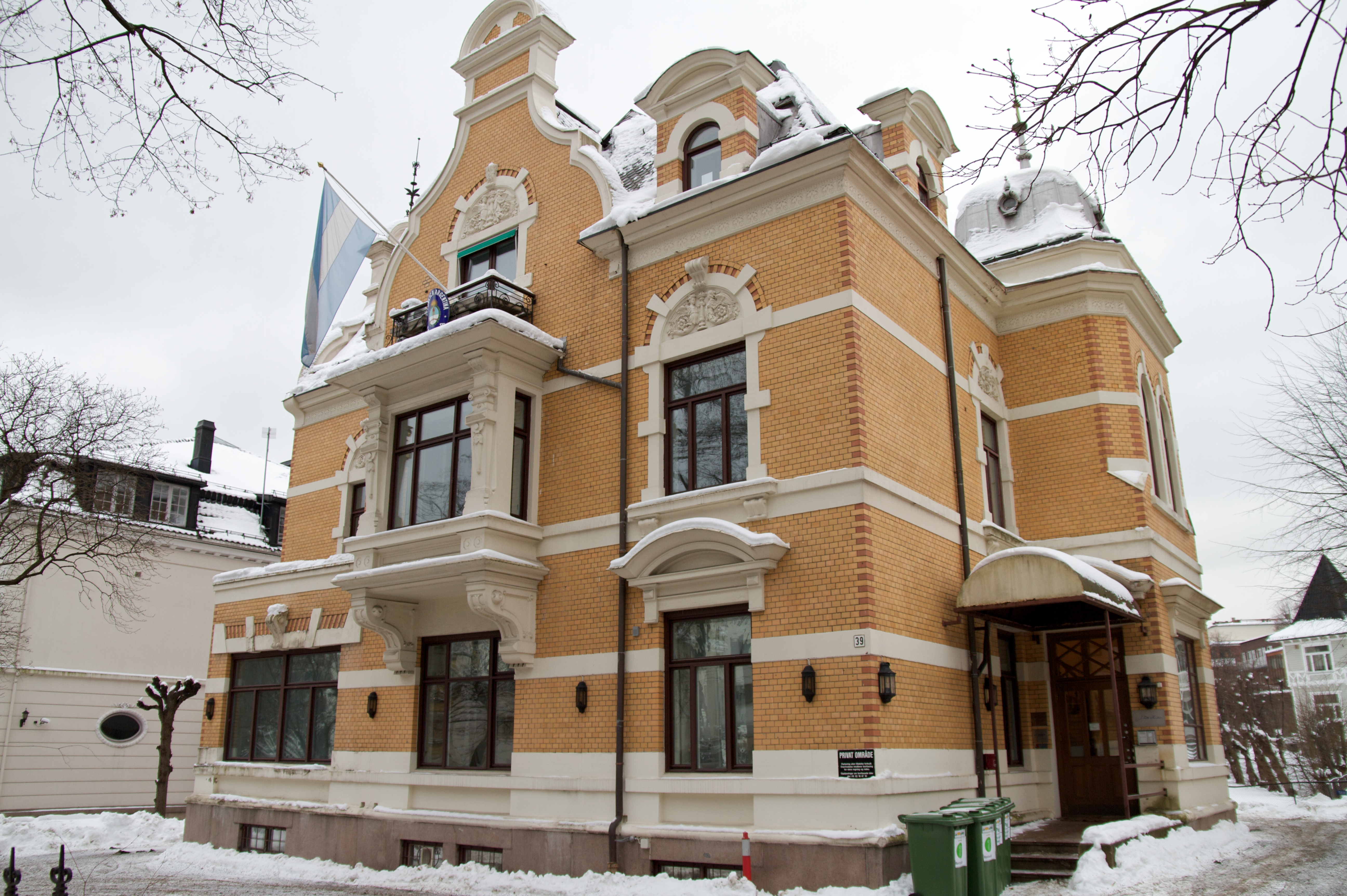 Drammensveien 39 i Oslo.